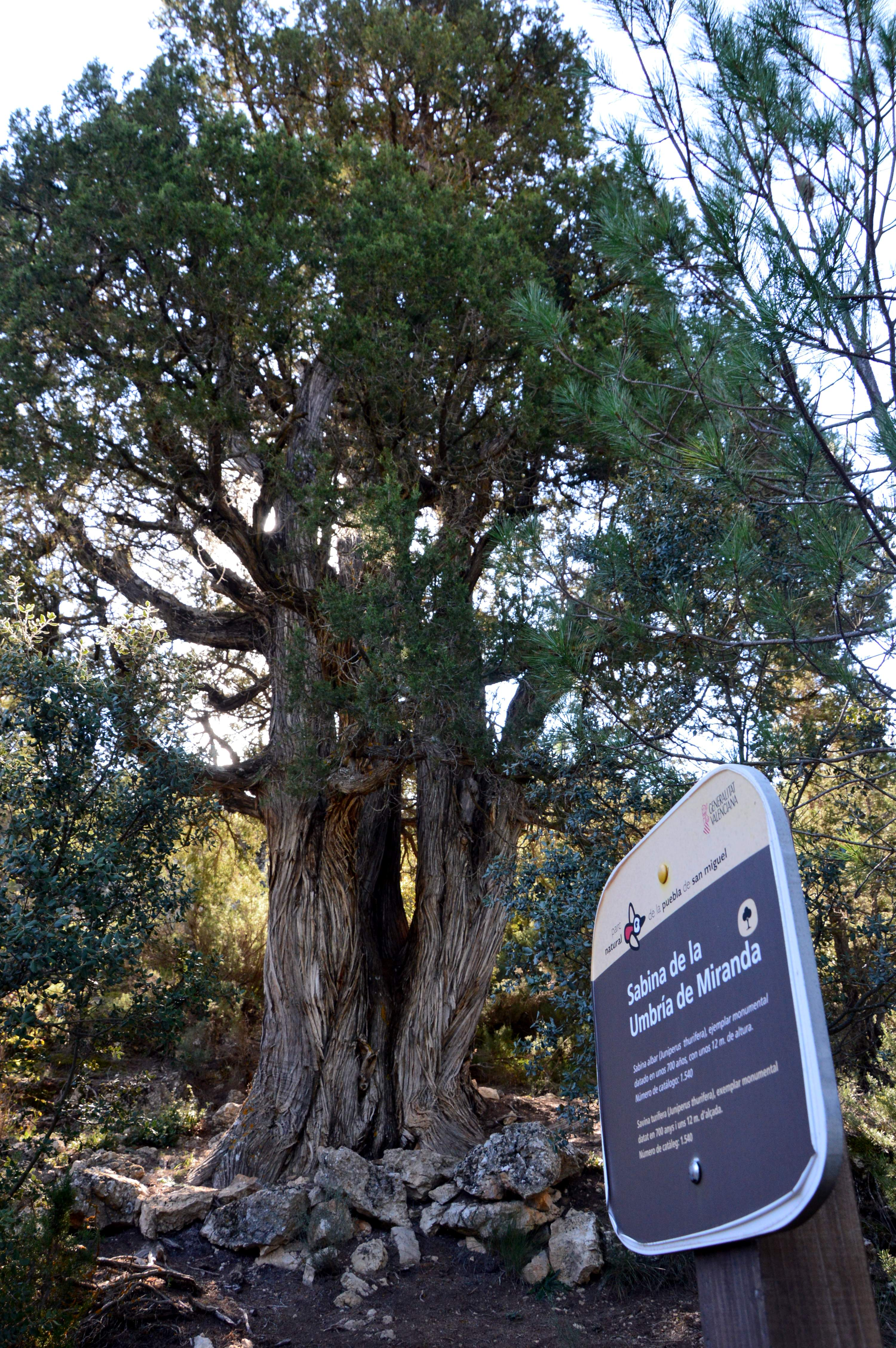 Vista general de la sabina de la Umbría de Miranda, Parque Natural de Puebla de San Miguel, Valencia (2018).